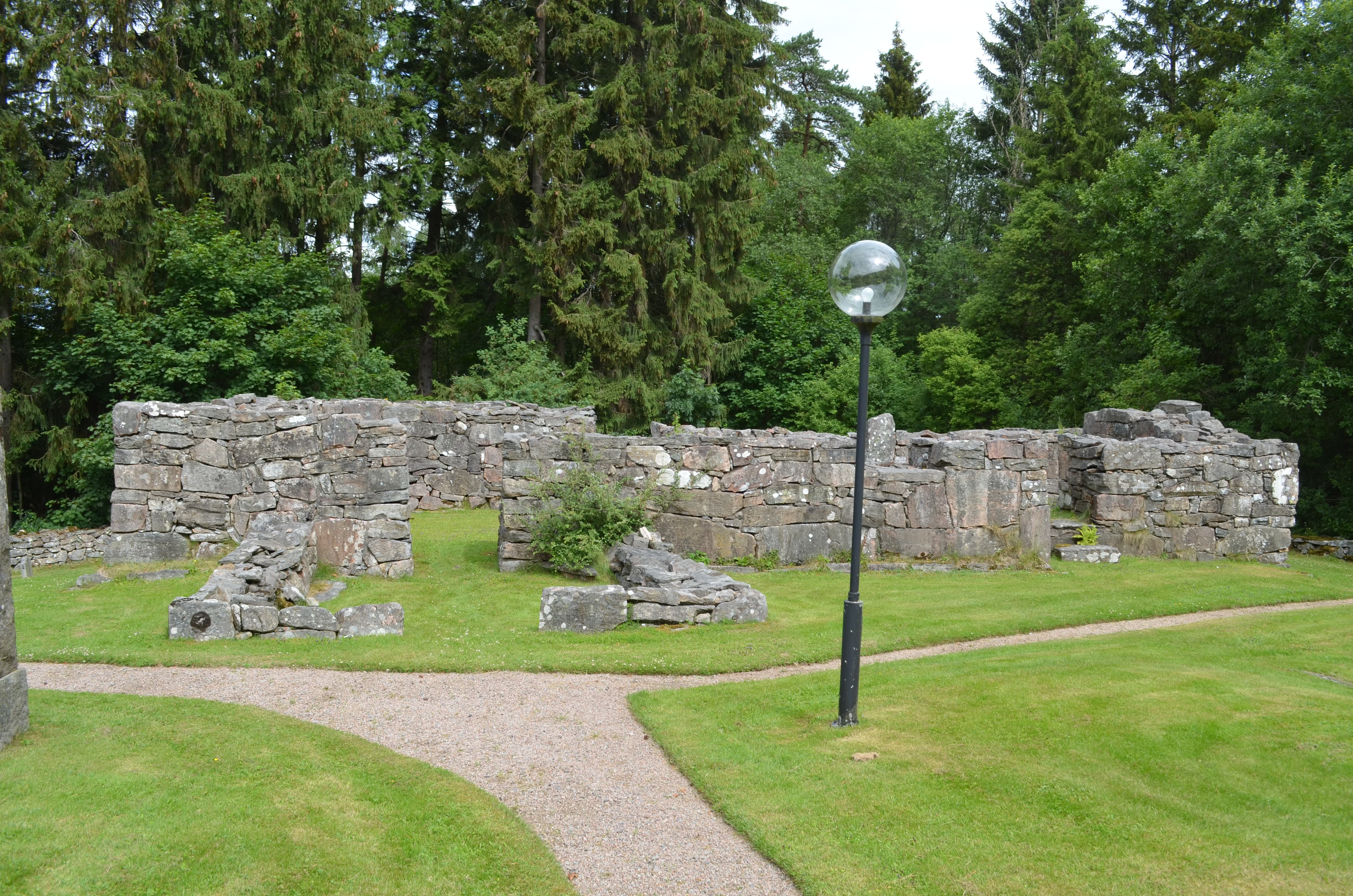 Kattunga kyrkas ruin